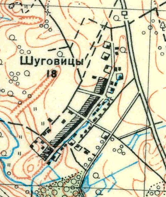 Топографическая карта Ленинградской области, квадрат О-35-22-Г-г (Торма), деревня Шуговицы.